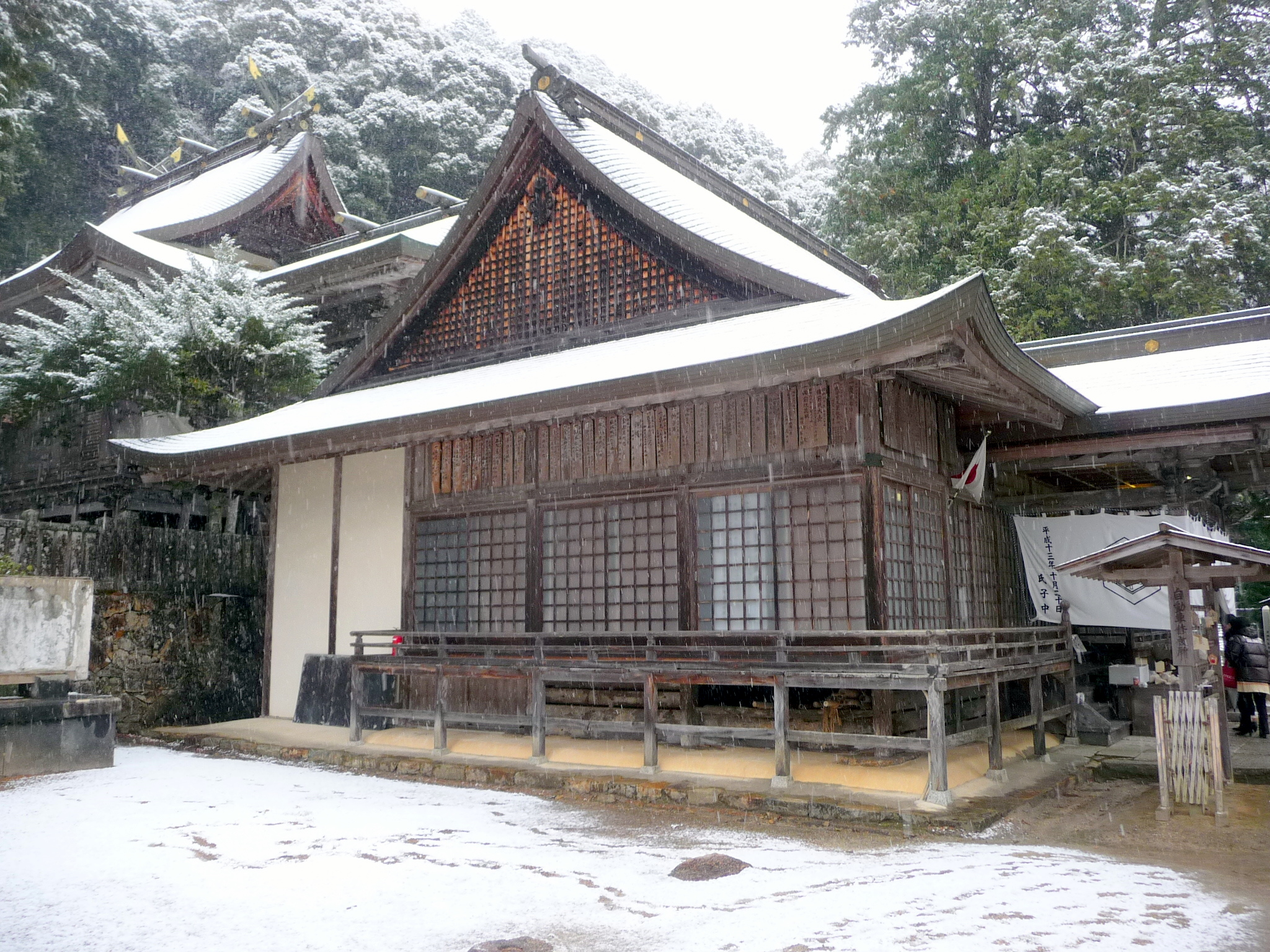 岡山市北区建部町下神目にある、志呂神社です。